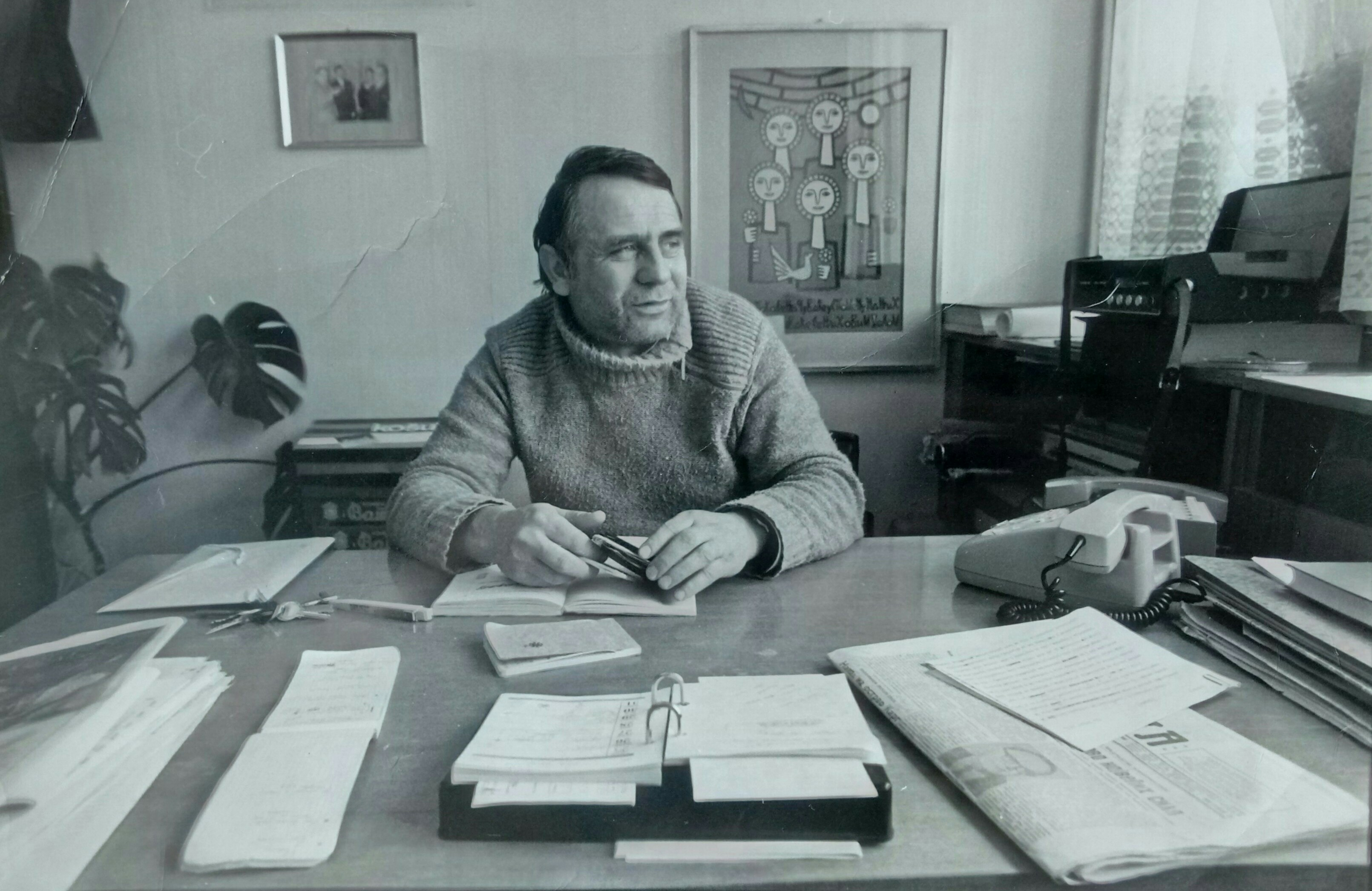 Драгутин Паунић на радном месту